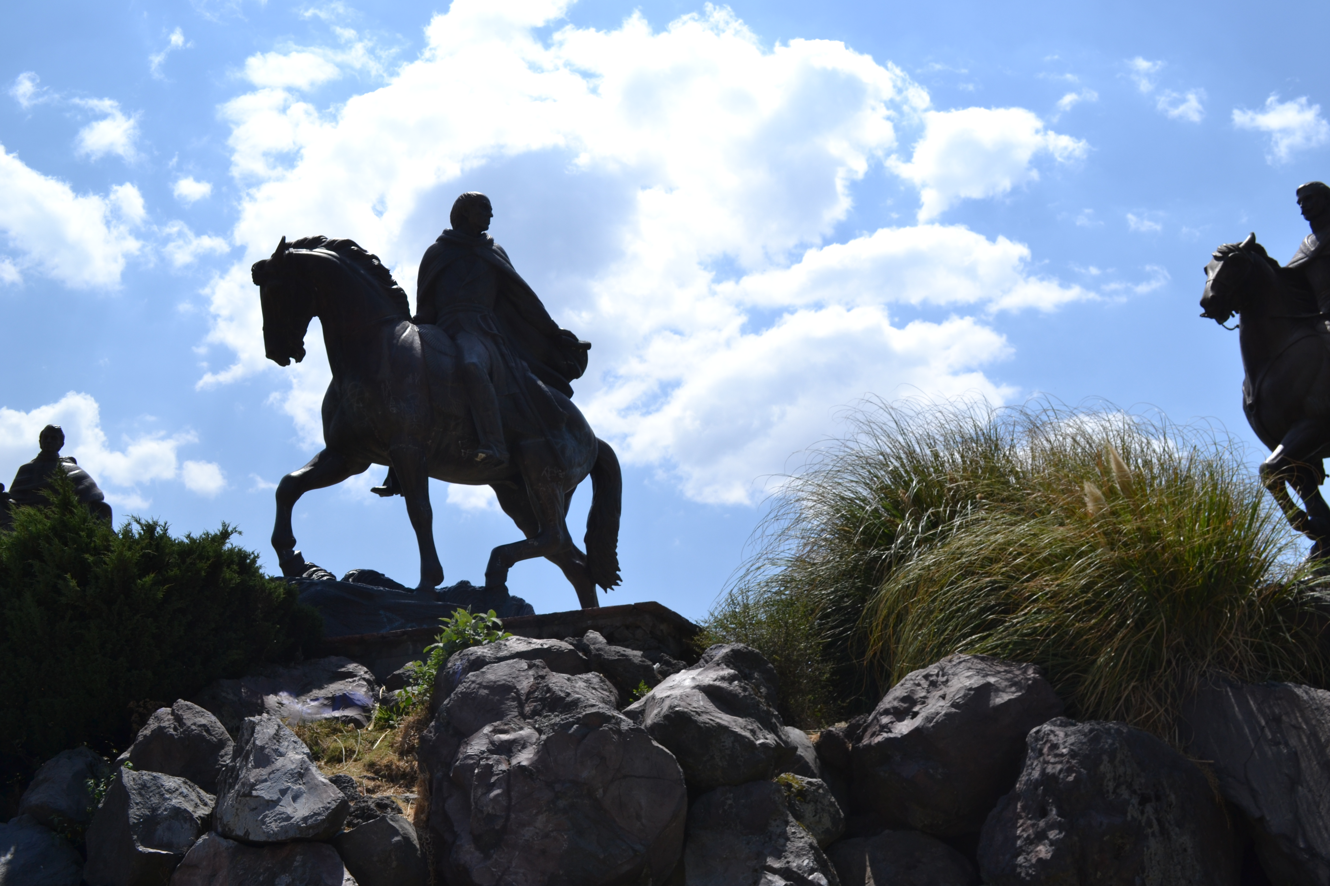 Conmemoración por la Batalla del Monte de las cruces